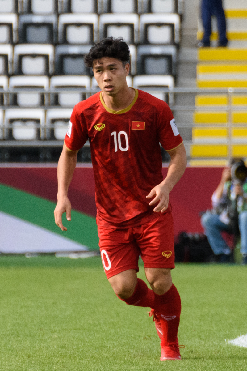 Nguyễn Công Phượng at the Asian Cup 2019